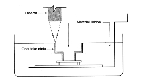 Estereolitografia